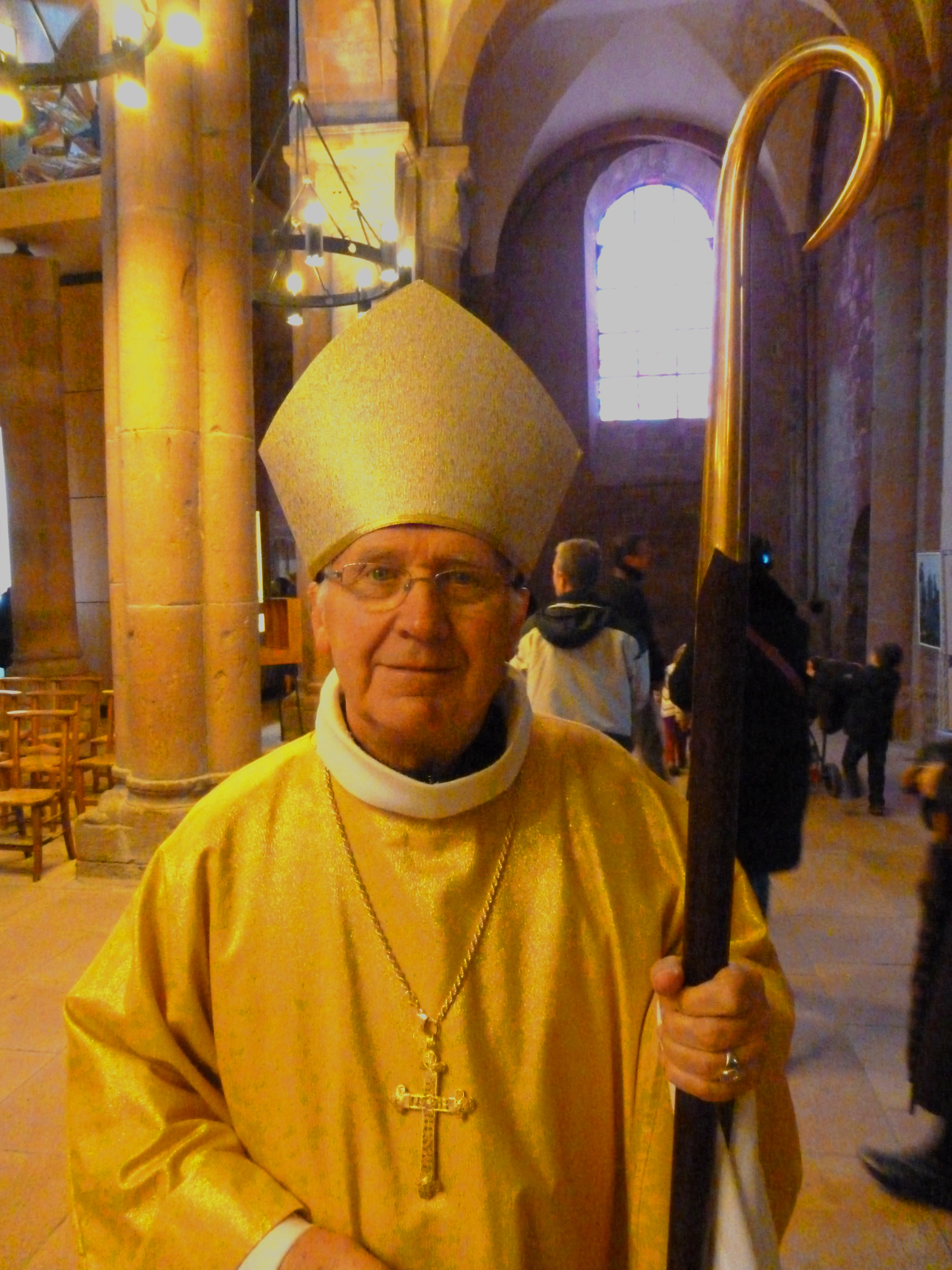 Mgr Jean-Paul Mathieu, évêque de Saint-Dié, en novembre 2013.